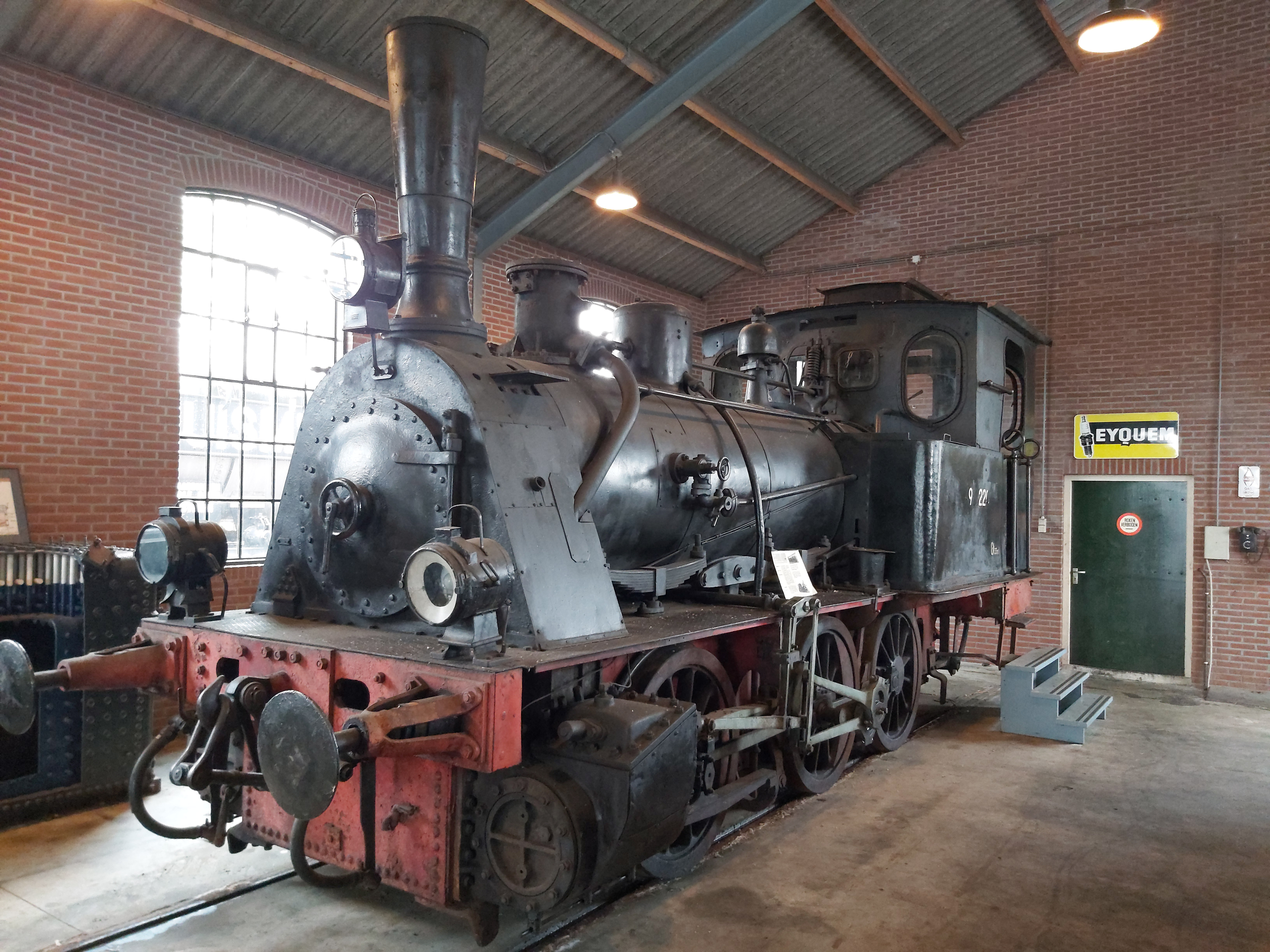 Locomotief T3 van de MBS in Haaksbergen.